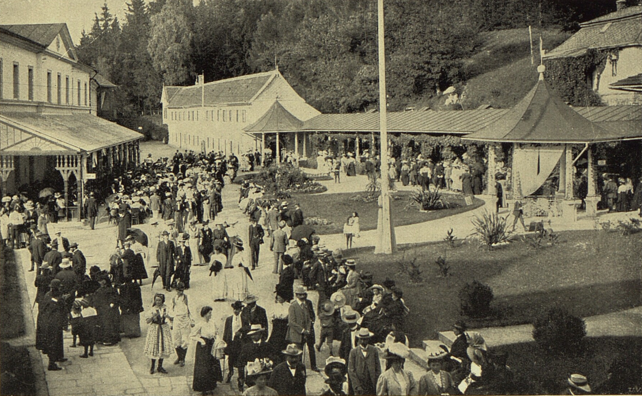 Stará kolonáda v Luhačovicích před rokem 1916. Převzato ze Světozoru